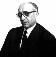 Aldo Capitini (1899 – 1968), intellettuale pacifista e nonviolento italiano.